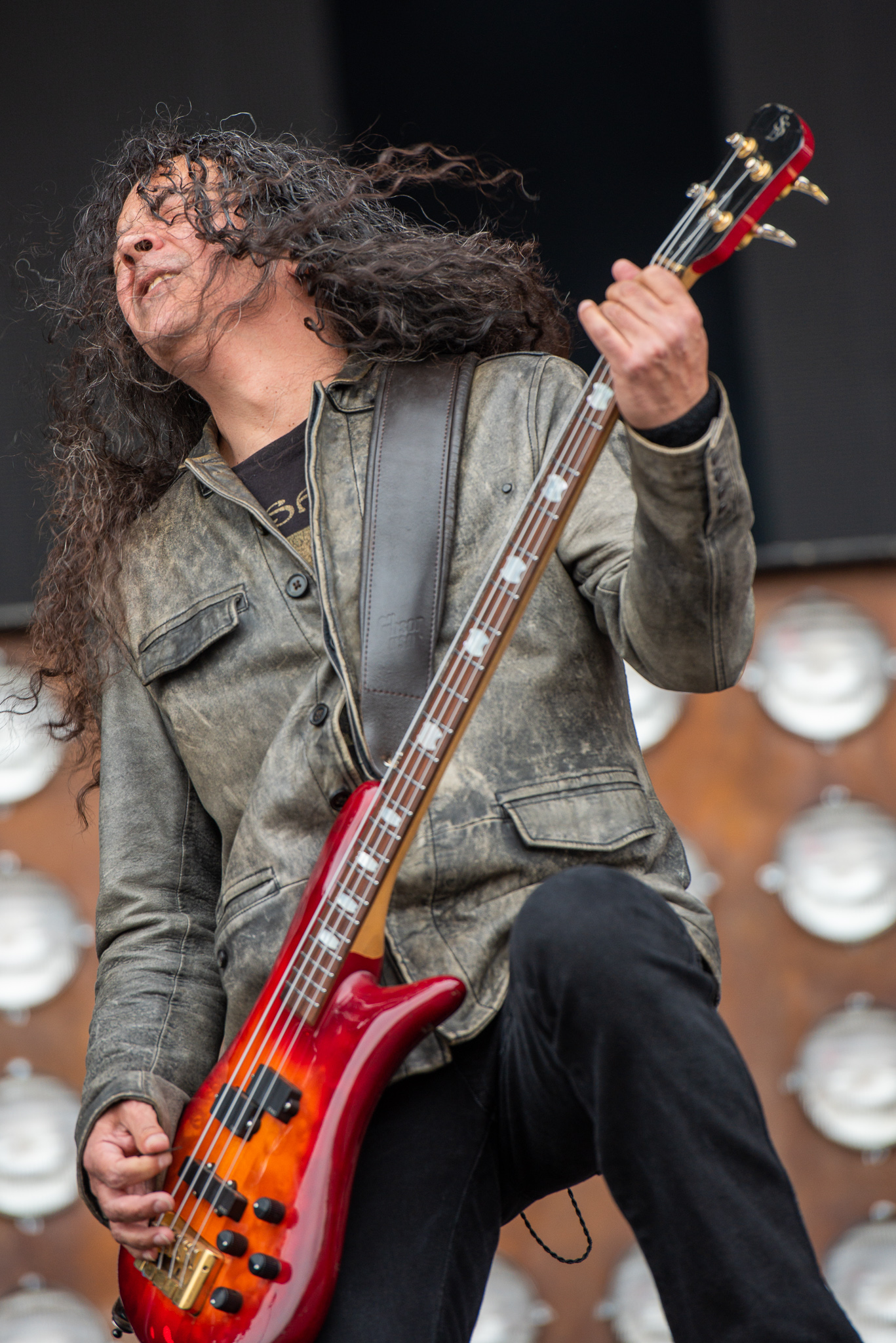 ARGO-Konzerte,Alice in Chains,Konzert,Livekonzert,Livemusik,Mike Inez,Musik,RiP,Rock im Park 2019,Zeppelin Stage